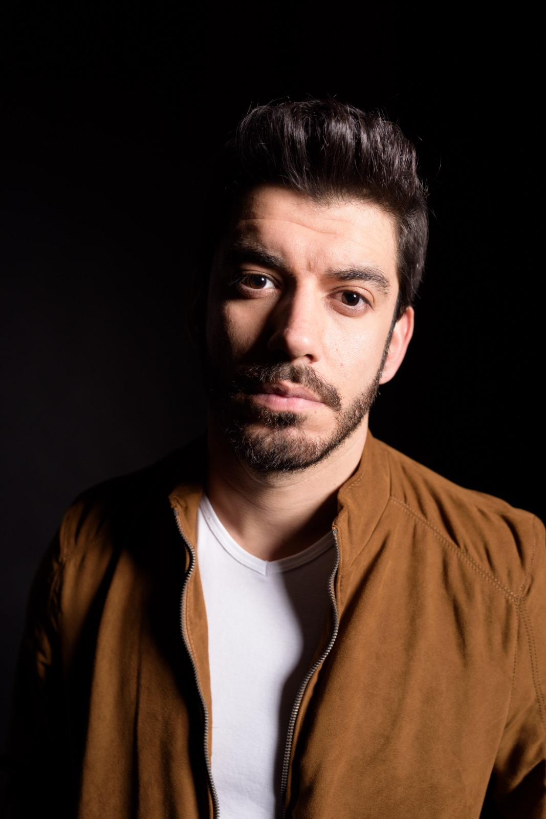 Serkan